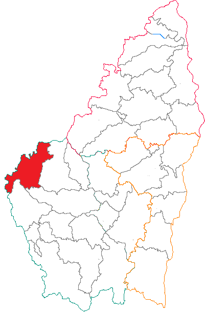 Situation du canton dans le département de l'Ardèche (France)